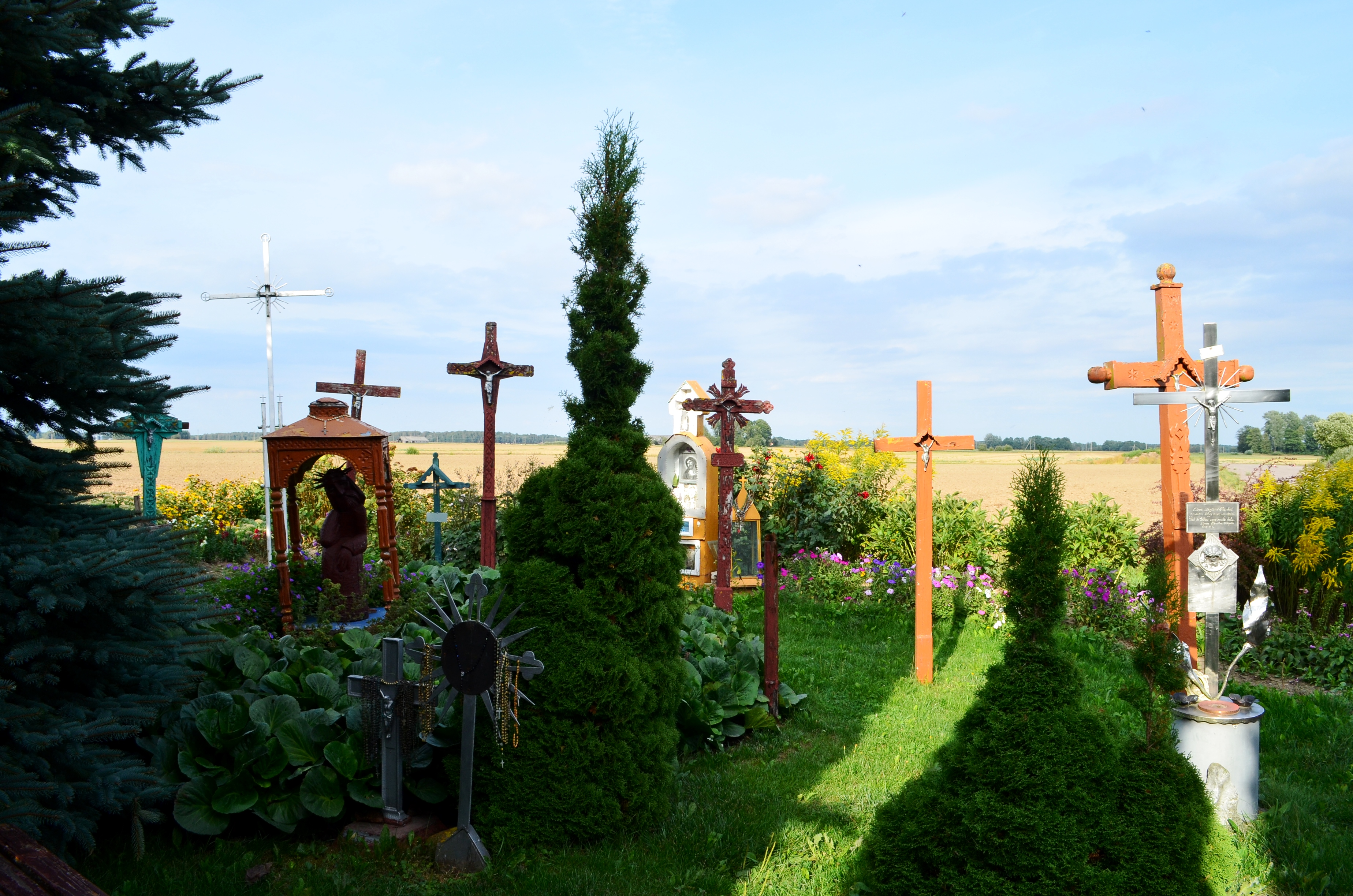 Šventvietė, Suodžiai, Šakių raj.